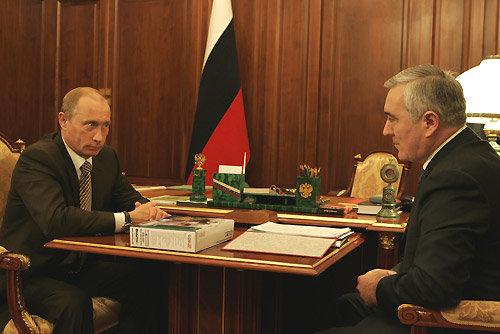 МОСКВА, КРЕМЛЬ. Встреча с Президентом Республики Ингушетия Муратом Зязиковым.